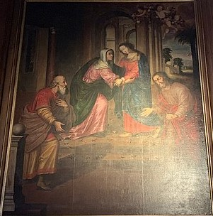 Tableau La Visitation de Benoît Alhoste peint en 1662, à l'intérieur de la co-cathédrale Notre-Dame de l'Annonciation, Bourg-en-Bresse.